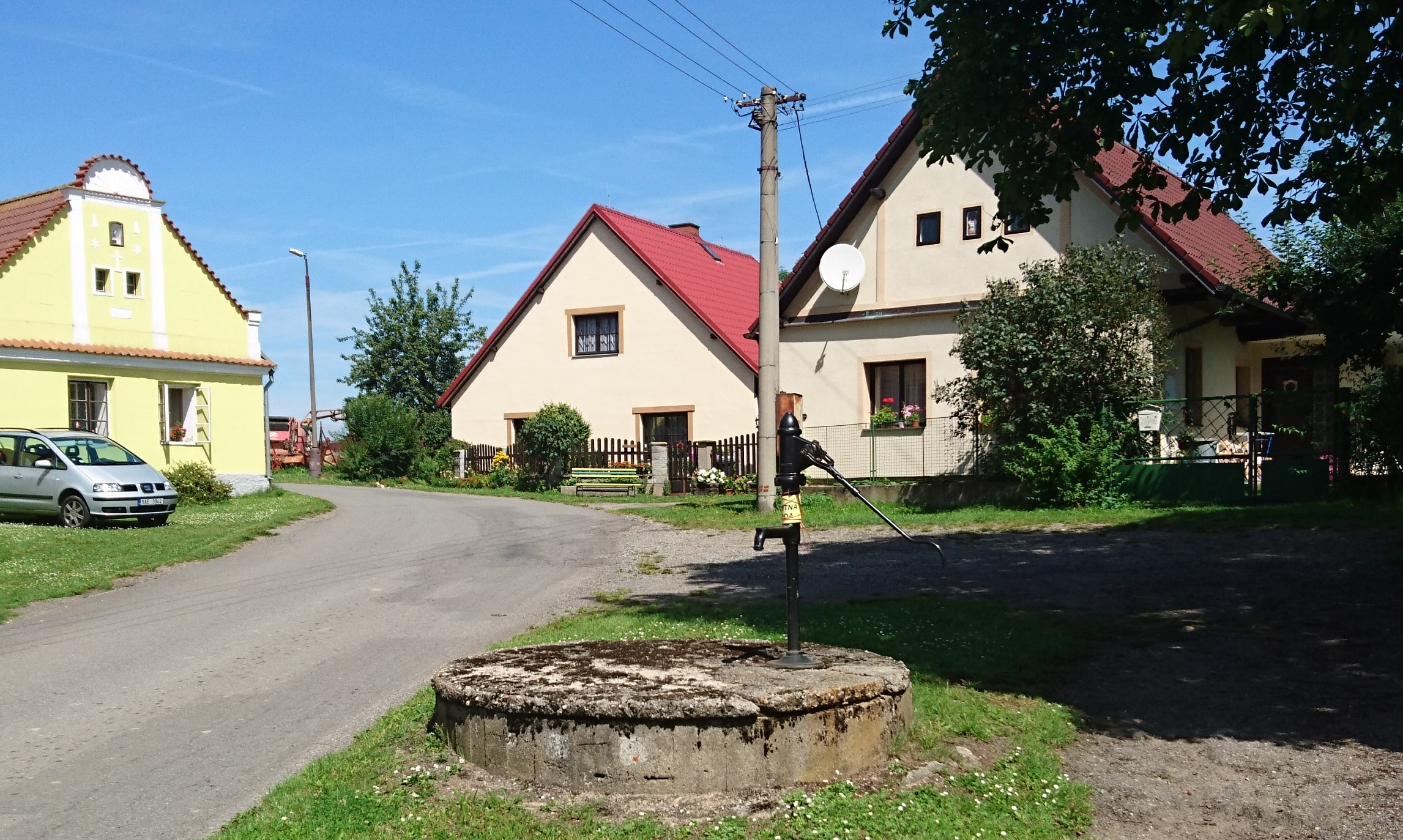 Náves s pumpou, Broučkova Lhota, místní část Chotoviny